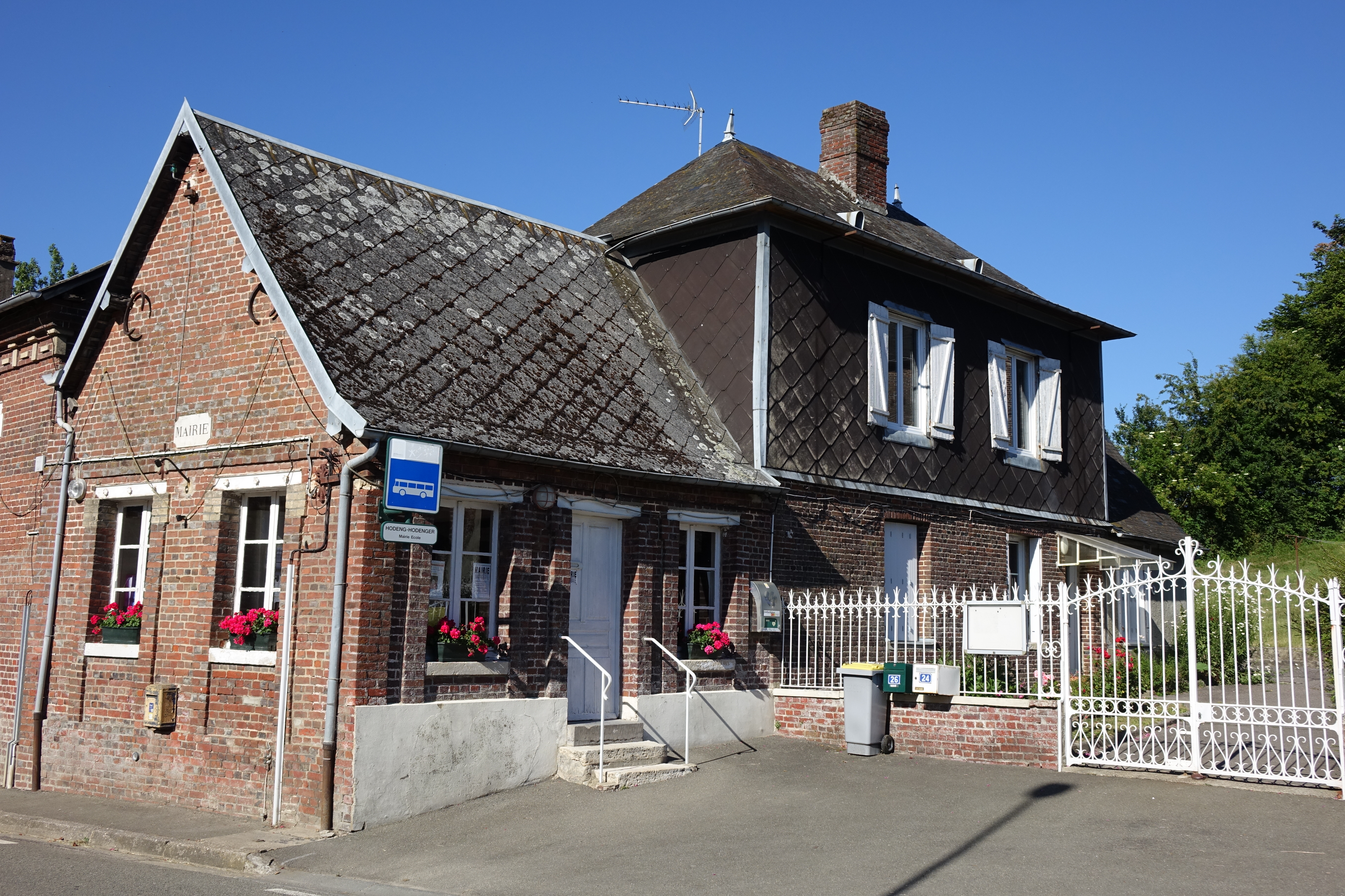 Église d'Hodeng-Hodenger, Seine-Maritime, France